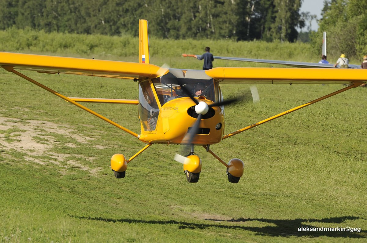 Aeroprakt-22L in flight